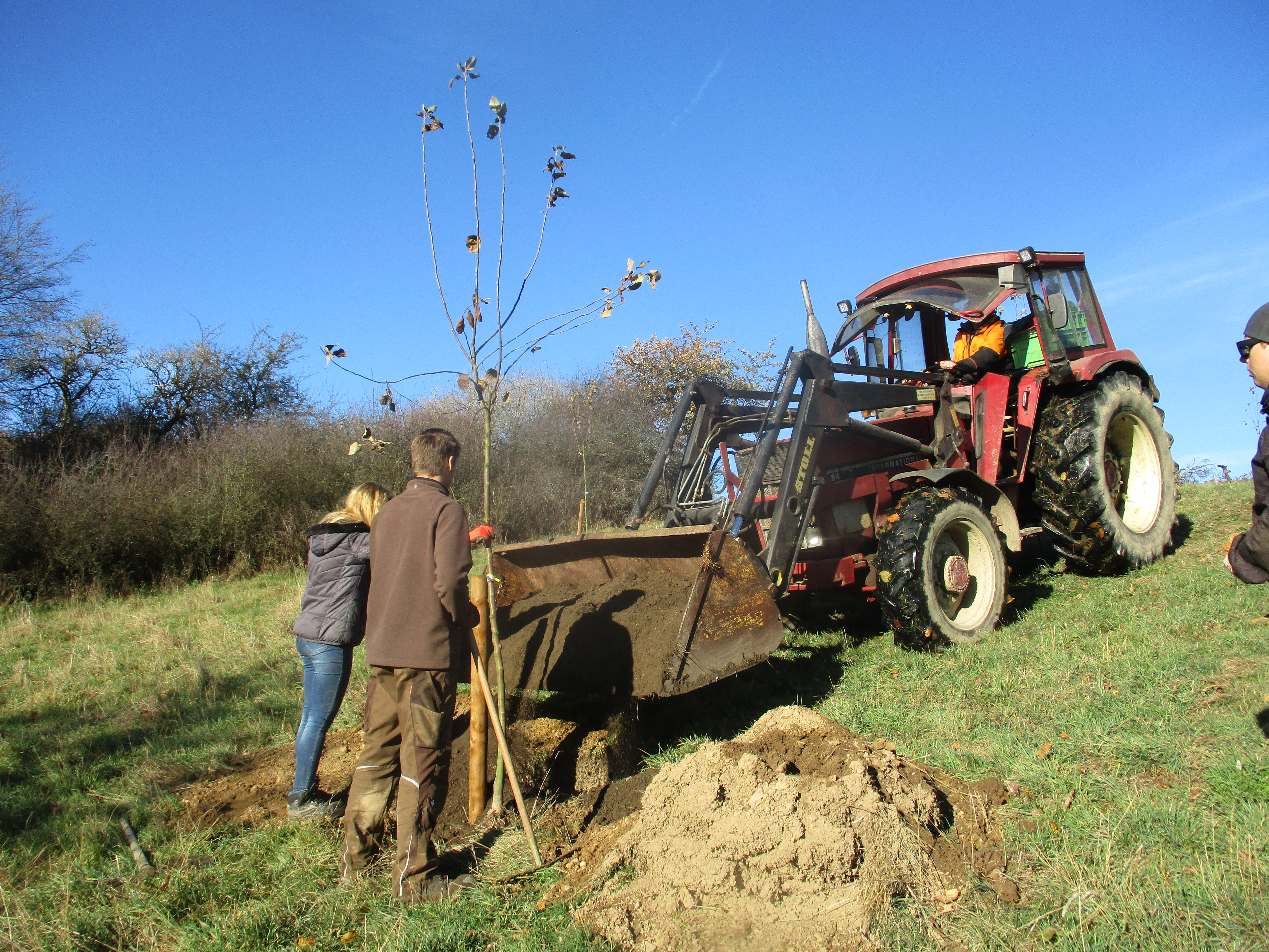 Pflanzung von einem Apfelbaum im "Geschützter Landschaftsbestandteil Apfelhof am Franziskus durch Landschaftspflegetrupp der Biologischen Station Hochsauerlandkreis.